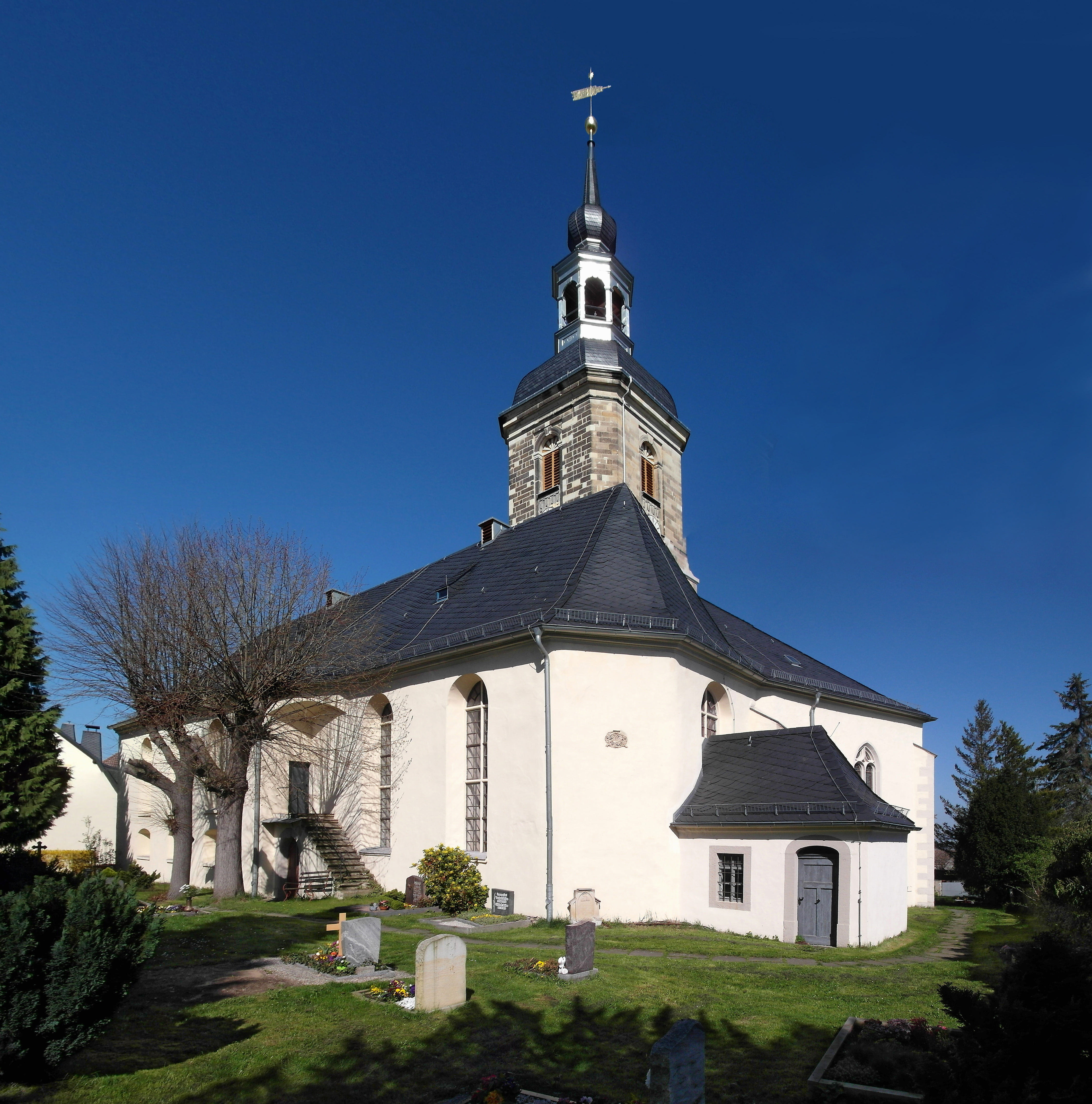 21.04.2016 01809 Burkhardswalde (Müglitztal): Die Kirche (GMP: 50.921267,13.858845) wurde erstmals 1444 erwähnt und um 1523 zu heutiger Größe erweitert. 1752 erhielt die Kirche ihren markanten, im Grundriß quadratischen Glockenturm an der Nordseite, den man nach einem Brand durch Blitzschlag 1799 wieder aufbaute und auf 41,5 m erhöhte. Bis 1865 war sie Begräbnisstätte der Familie von Bünau auf Schloß Weesenstein. [SAM4524+4527+4529+4530.JPG]20160421010MDR.JPG(c)Blobelt